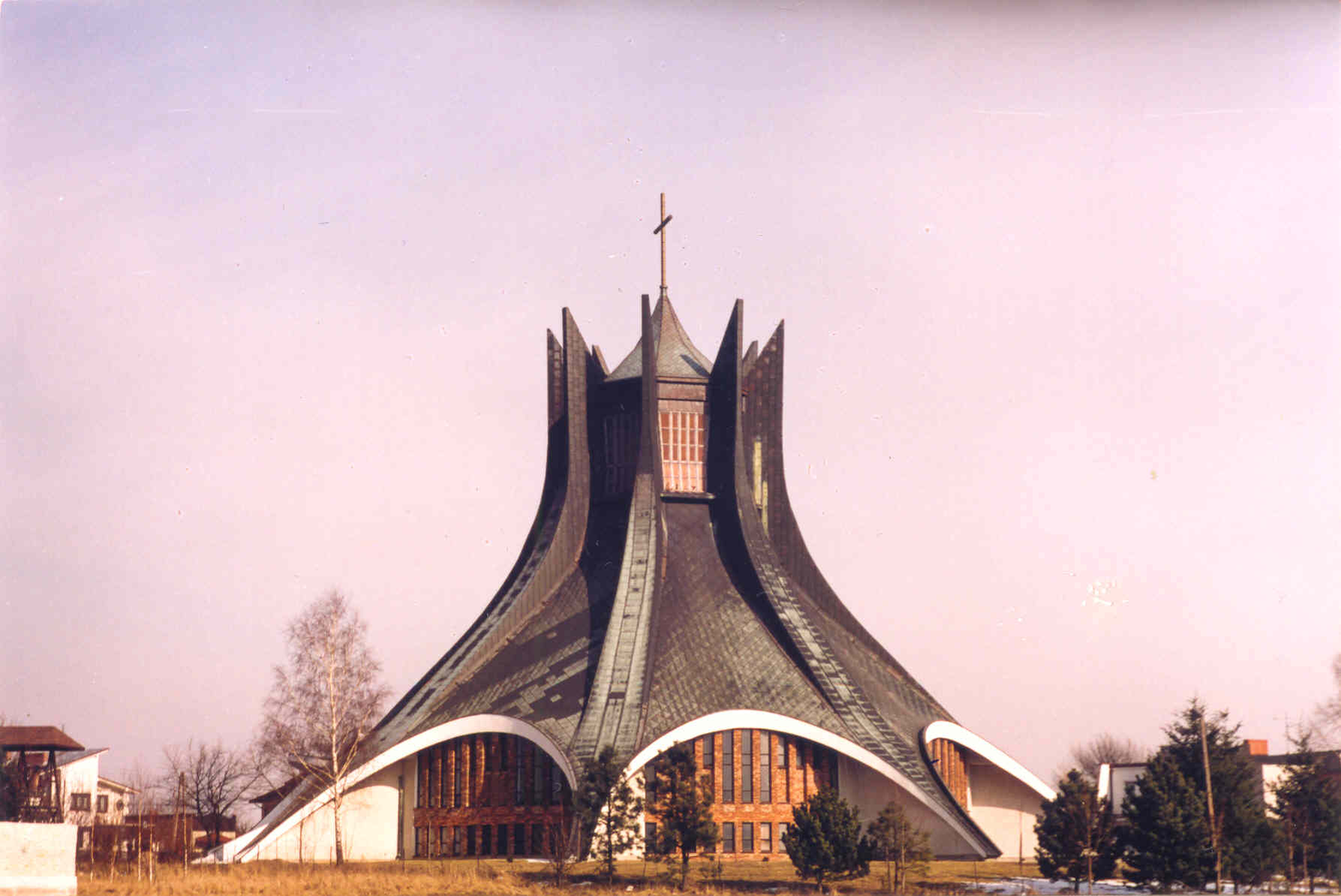 Kościół św.Brata Alberta w Częstochowie w dzielnicy Kiedrzyn